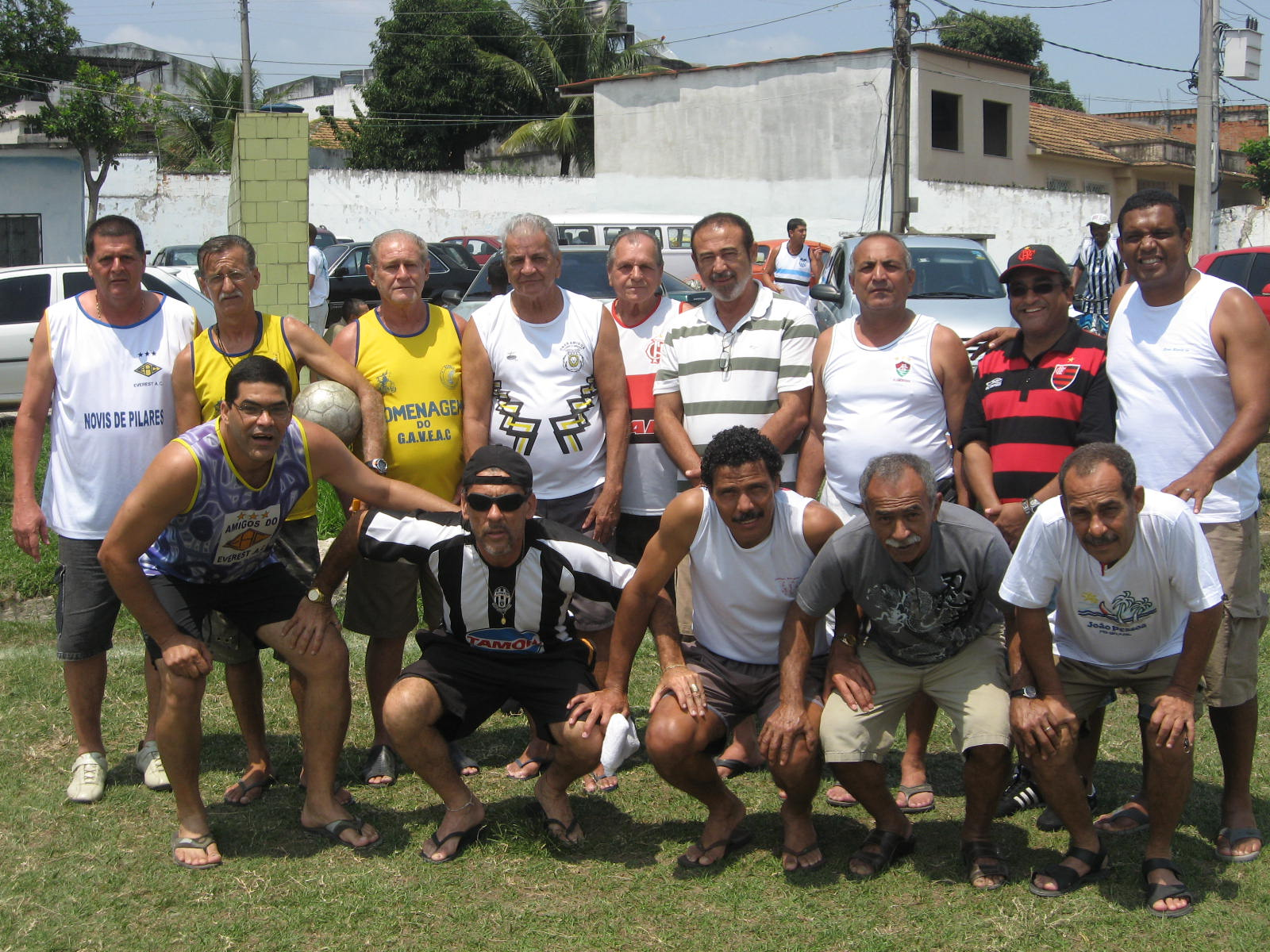 Velha Guarda do Everest AC